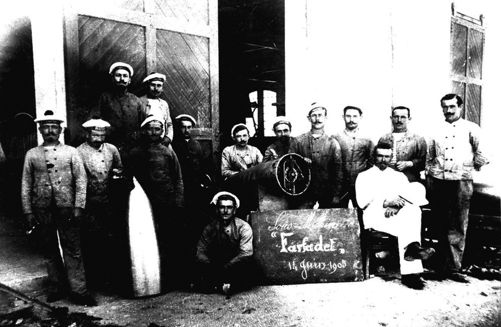 Sous mariniers du Farfadet - 14 juin 1905